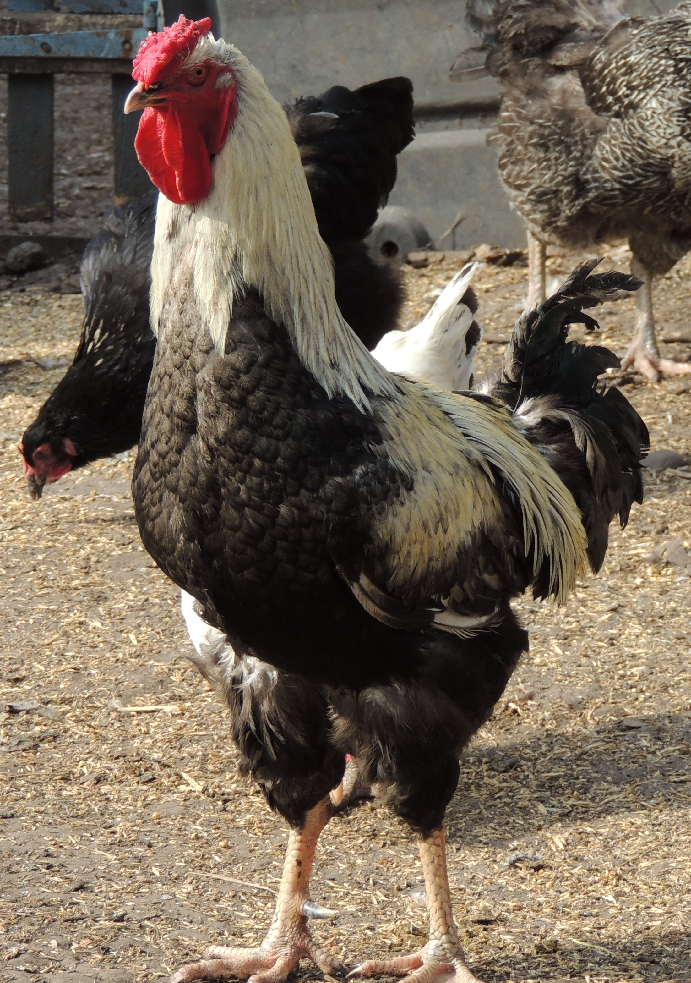 Юрловский голосистый петух с розовидной формой гребня